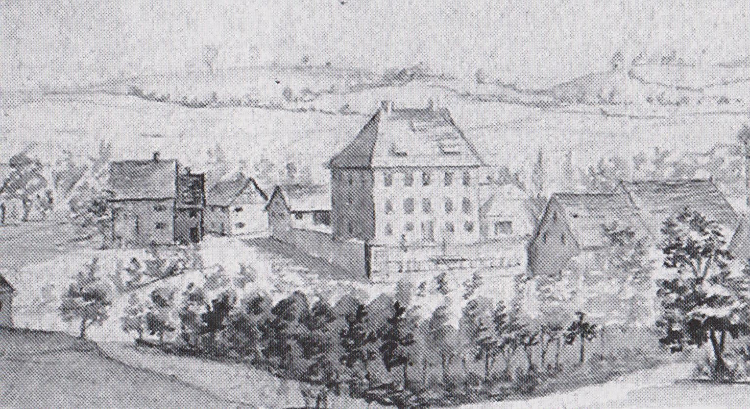 Deutschland (D) - Baden-Württemberg (BW) - Landkreis Konstanz (KN) - Mühlingen: "Schloss Mühlingen"; Federzeichnung von Johann Sebastian Dirr (1766-1830), um 1800/1830 (Ausschnitt); heute im Besitz des Stadtarcivs Überlingen.